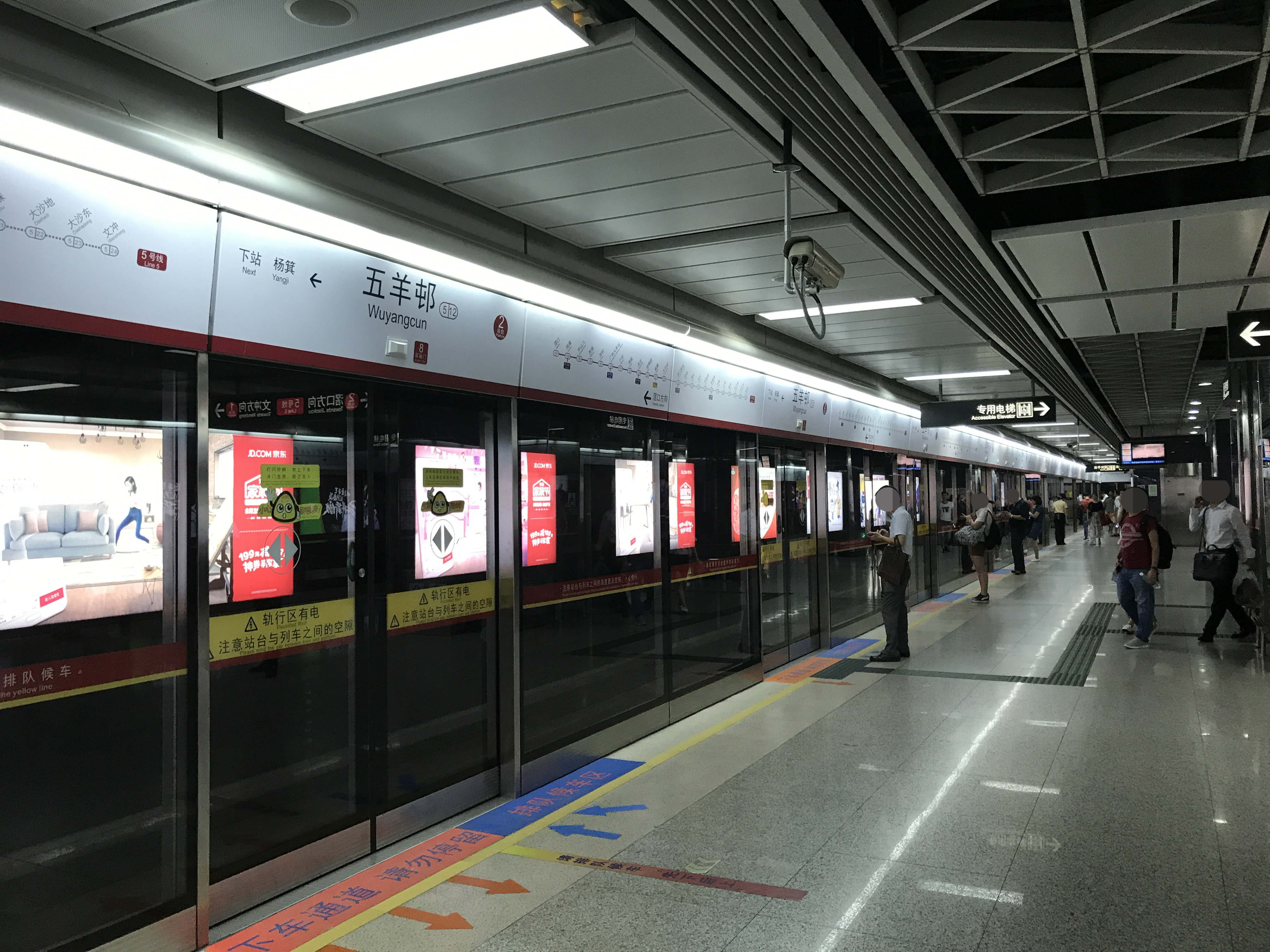 广州地铁五羊邨站